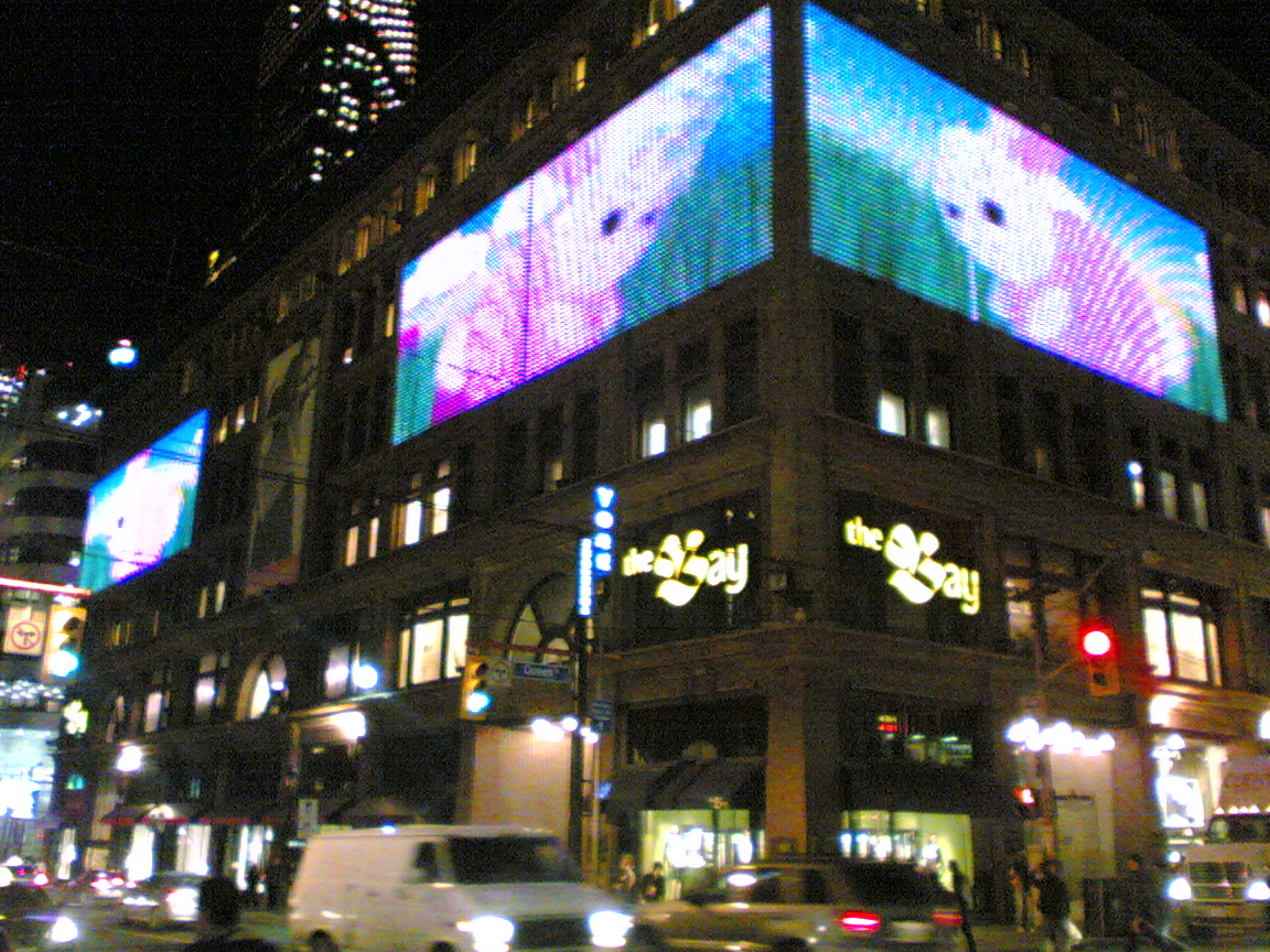 Кръстовището между Ианг и Куийн стрийт в Торонто